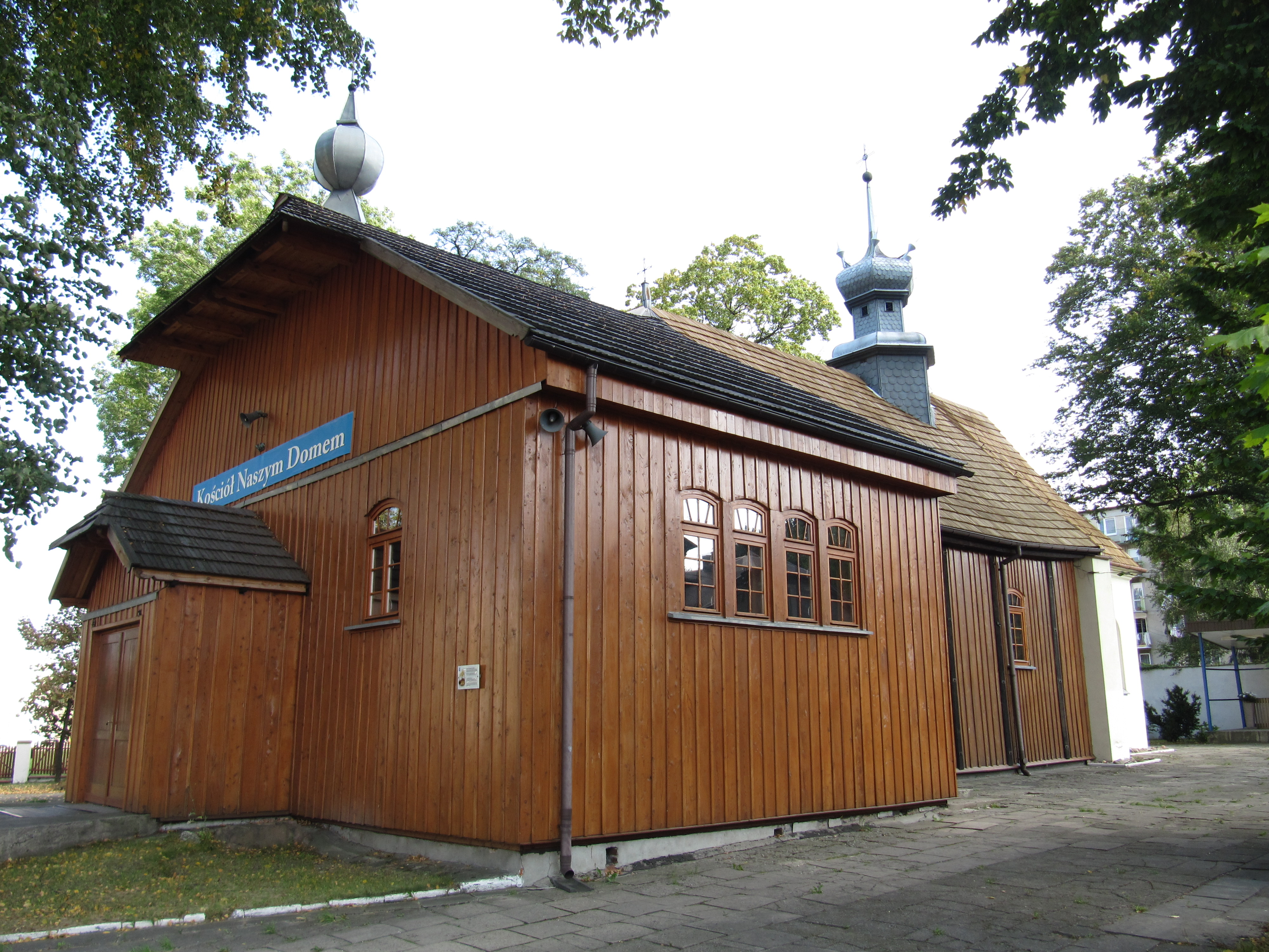 Radomsko, ul. M. Konopnickiej 4 - Kościół parafialny pw. św. Marii Magdaleny, drewn., XVII/XVIII - widok od prawej strony (zabytek nr 166/746)